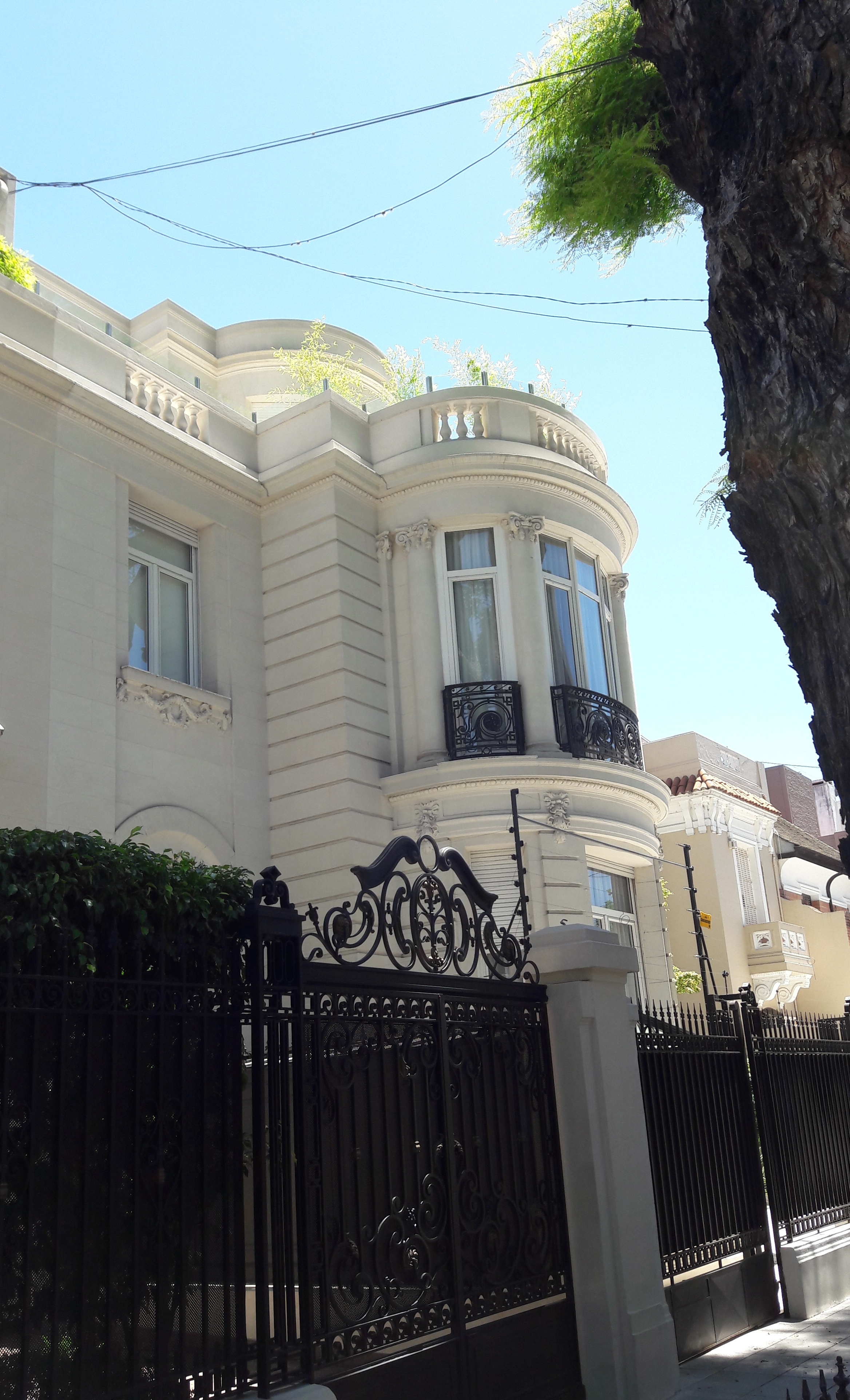 En Gorostiaga 2115 (Buenos Aires) funcionó durante unos pocos años la embajada de Corea de Norte ante Argentina. Fue abandonada unilateralmente en enero de 1977. Fuente: Consejo Argentino para las Relaciones Internacionales